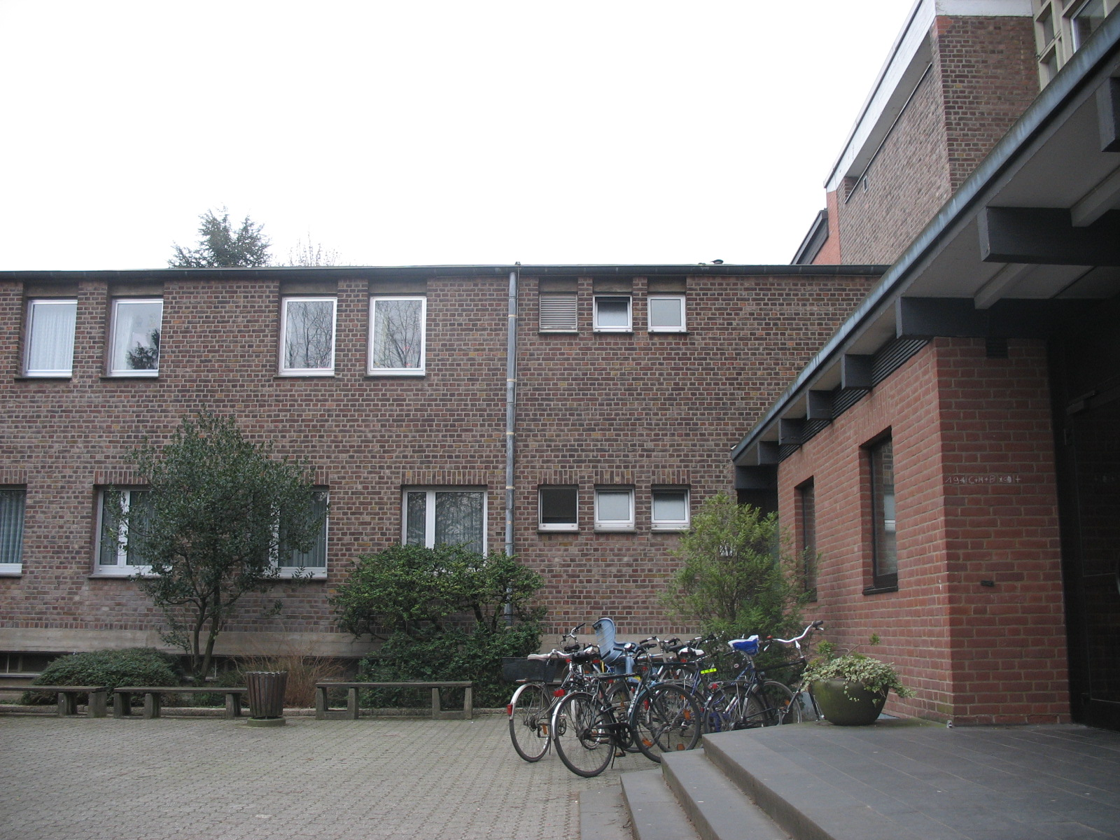 Schwesternhaus der Liebfrauenschule Köln